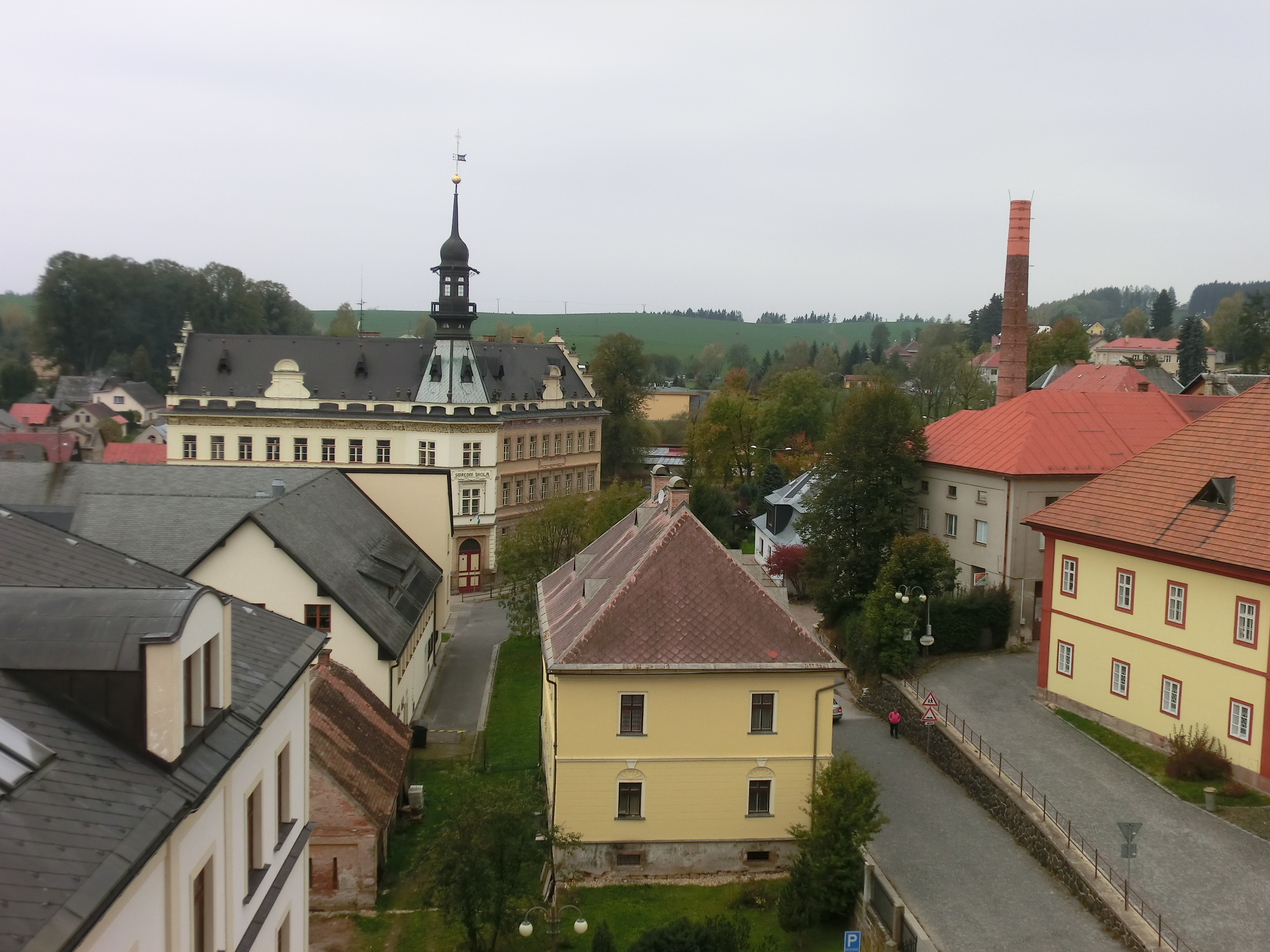 Barokní kostel sv. Vavřince v Jilemnici byl vystavěn v letech 1729 až 1736, střešní konstrukce je asi z roku 1869.